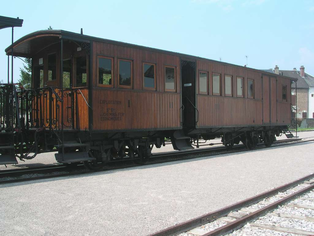 La voiture mixte ABCDf 12 Réseau Breton préservée par le CFBS